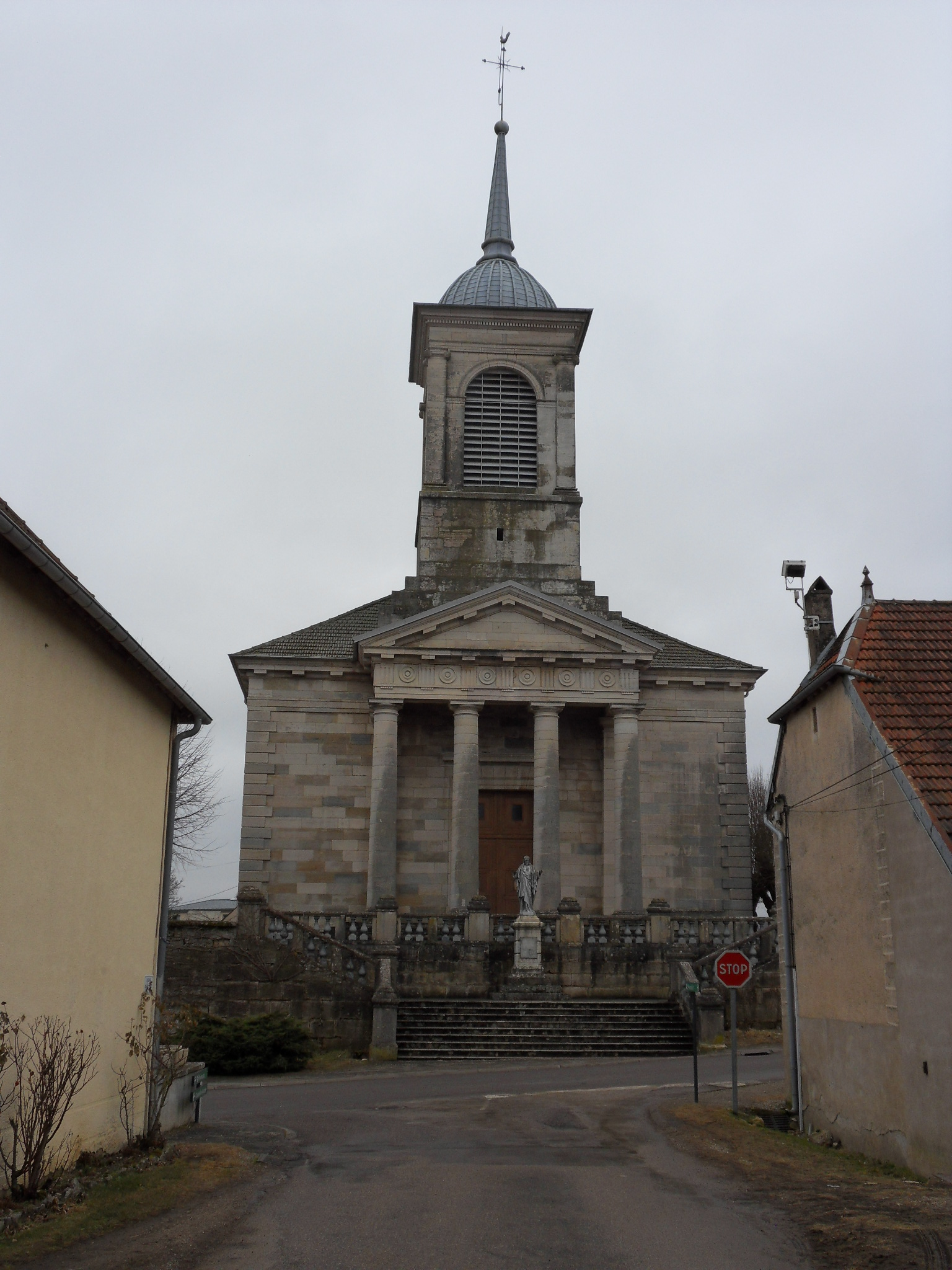 Église de Valay (Haute-Saône).